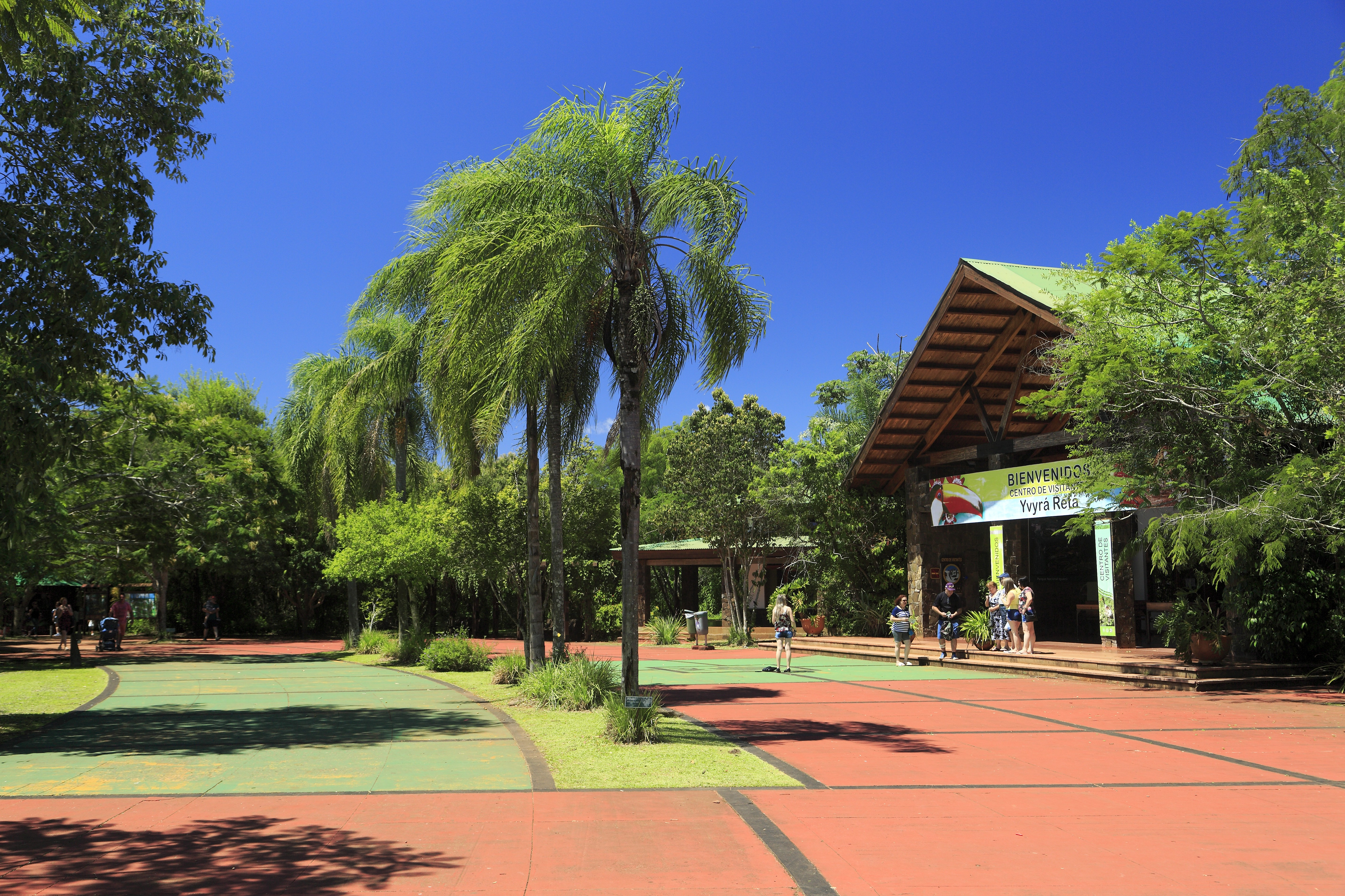 Parkartig gestaltet, davor liegt natürlich der Kassenbau. Waldeintritt, den es im europäischen Raum kaum gibt, ist in Nationalparks beider Amerikas die Regel. Hier ist er allerdings gestaffelt, Mercosur-Bürger zahlen deutlich weniger und die Bewohner der Umgebung nichts. Sicherlich ein wichtiger Punkt für die Akzeptanz des Nationalparks bei der lokalen Bevölkerung.